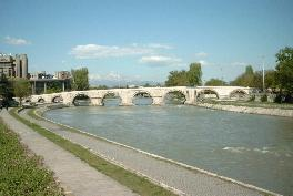 Skopje2 ved Vardar den 19 04 2005